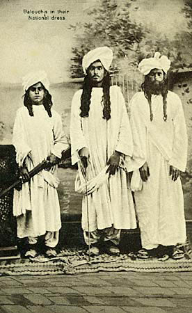 1910ء بلوچ لوگ اپنے روائتی لباس میں.